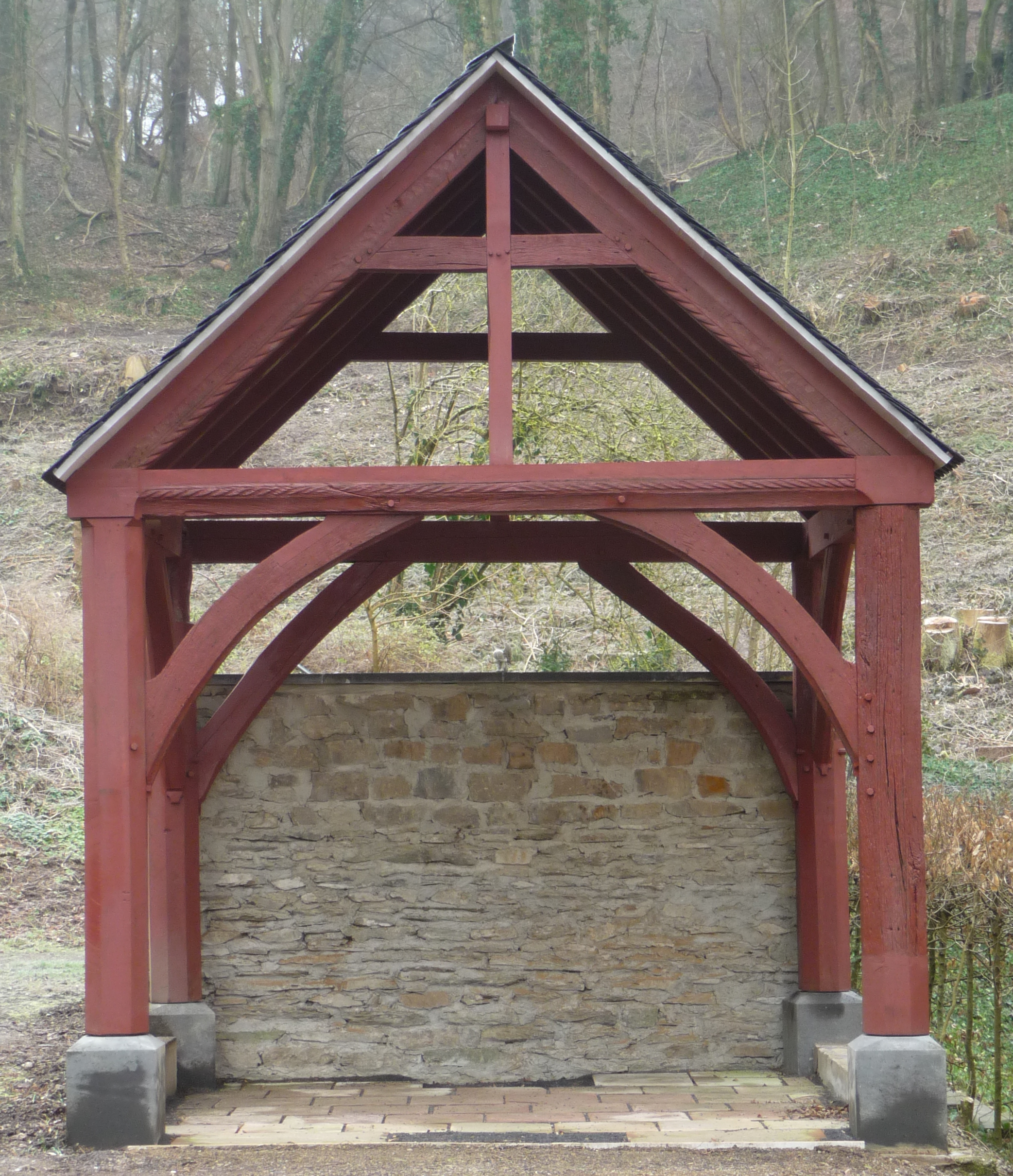 Abtei Sayn, Friedhofskapelle nach der Renovierung 2015